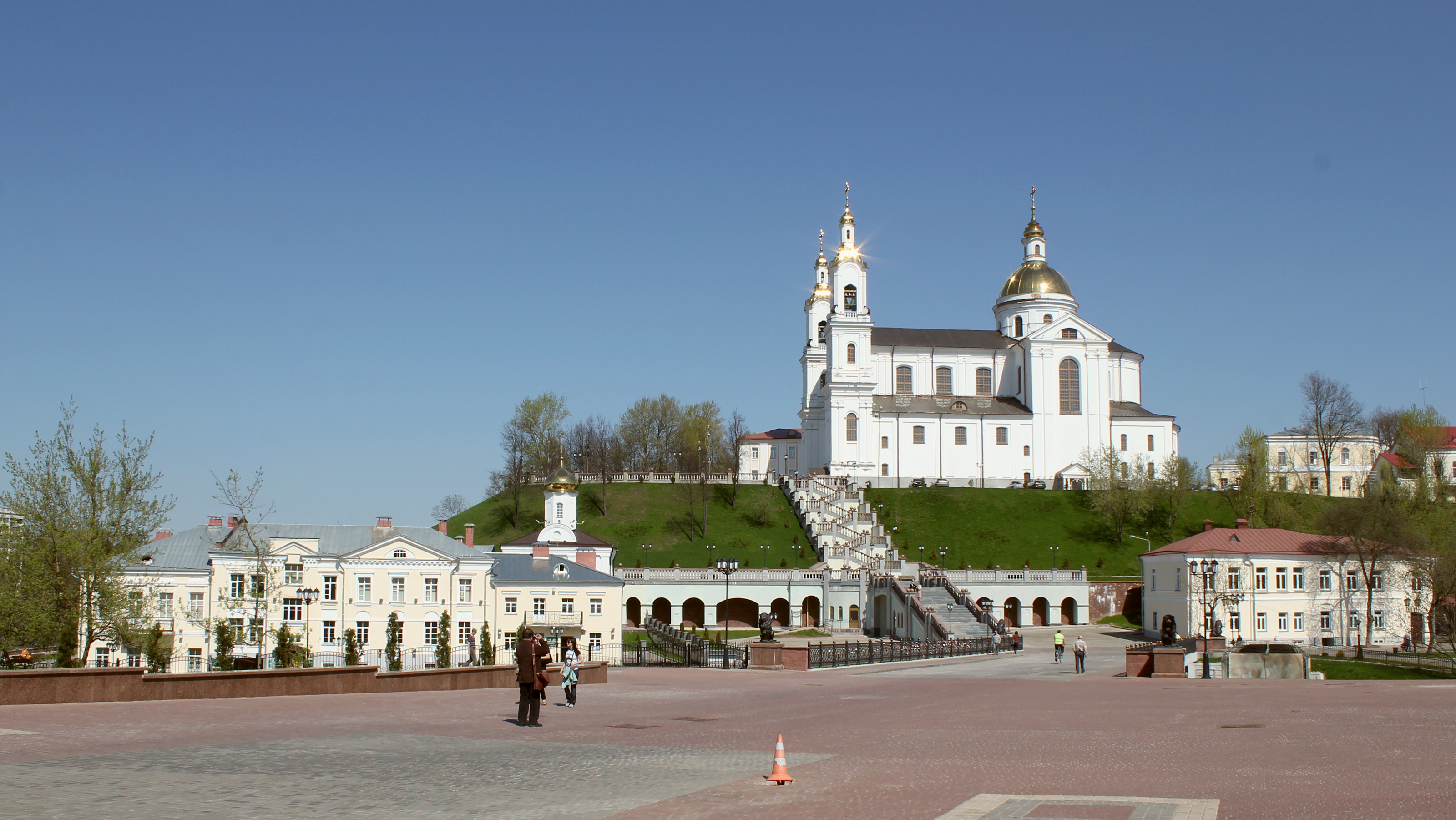 Вид на Успенский Собор, Свято-Духов женский монастырь, Пушкинский мост с улицы Пушкина. 2012 г.